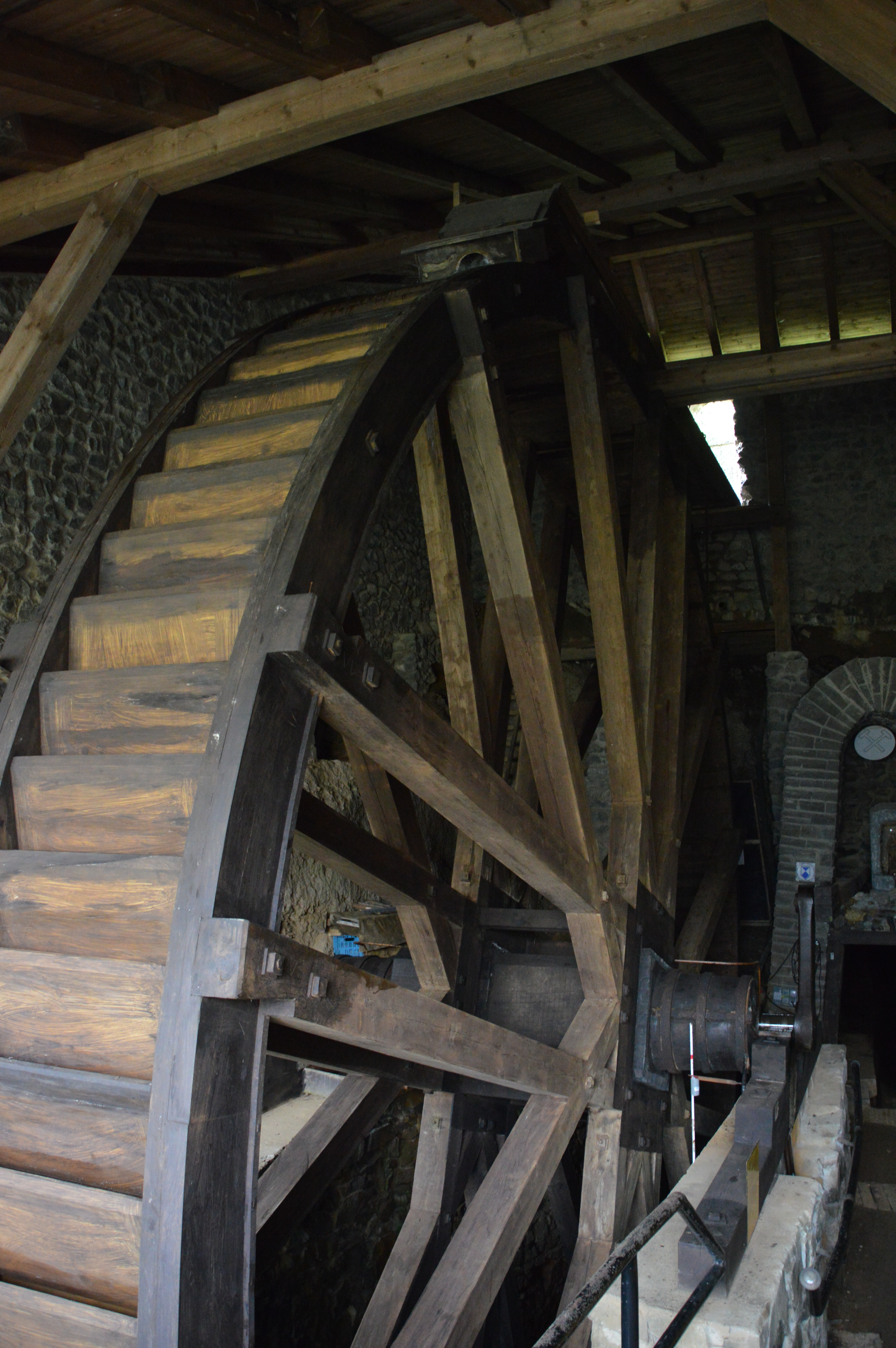 Grube Glasebach Wasserrad